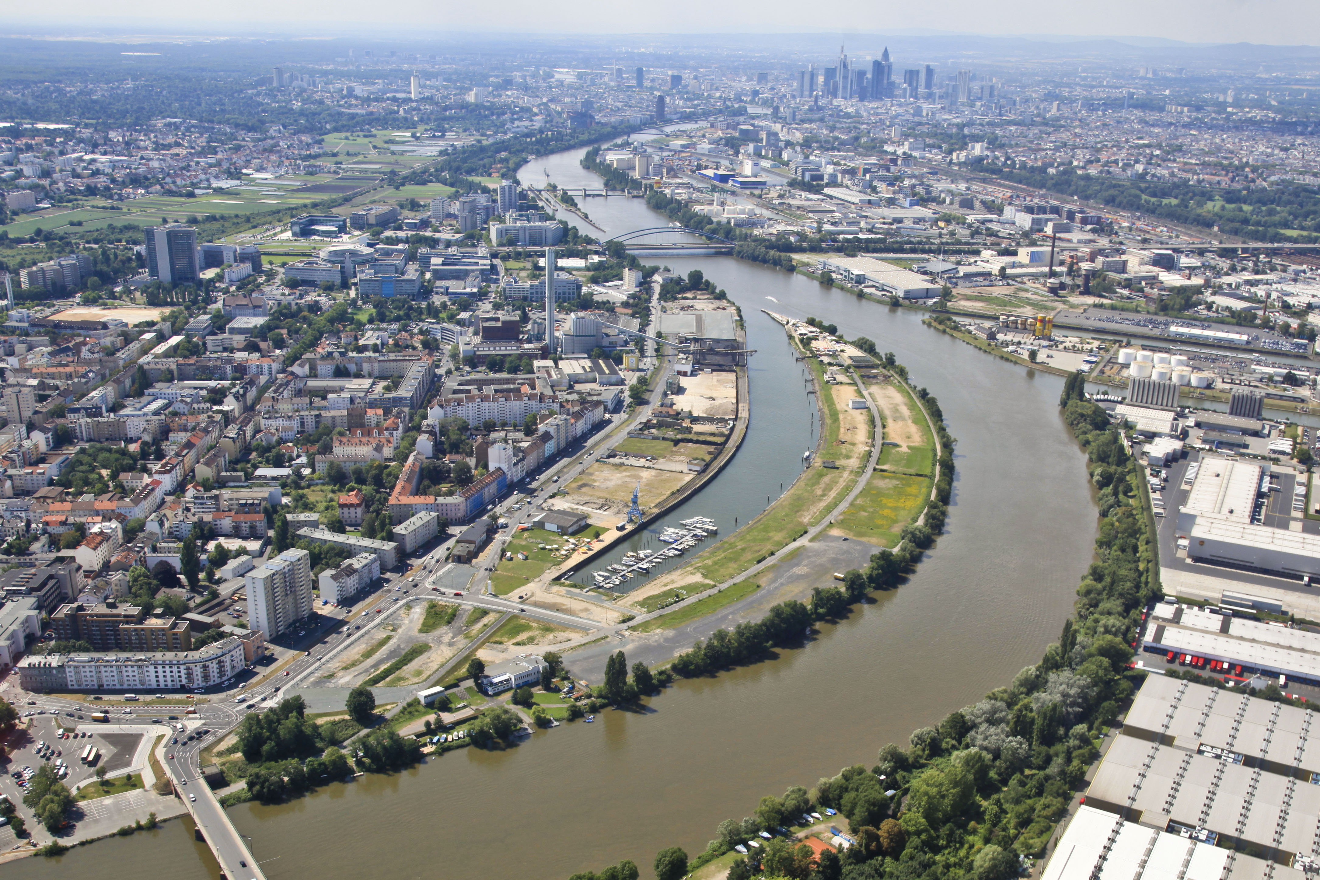 Luftansicht der Offenbacher Innenstadt